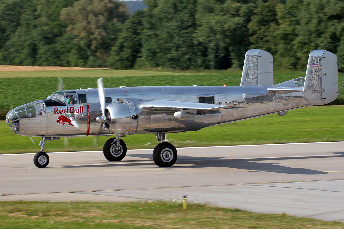 Augsburg Airport (EDMA/AGB)